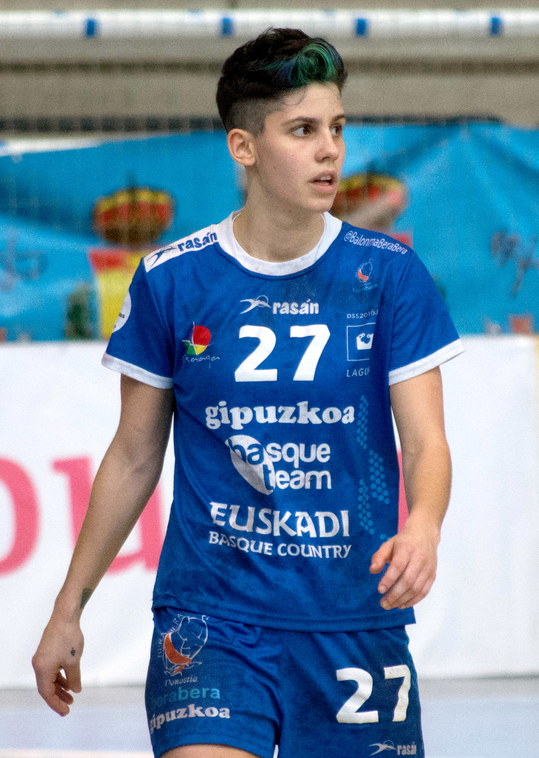 Copa De S. M. La Reina 2016 de Balonmano - O Porriño